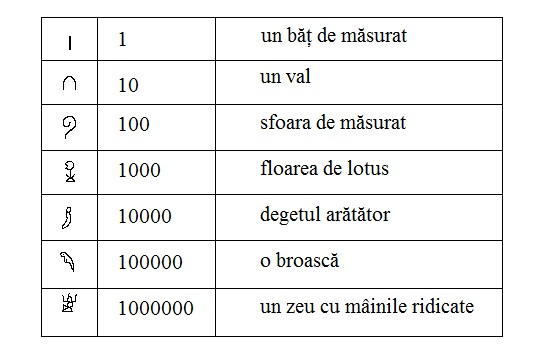 Sisteme de calcul